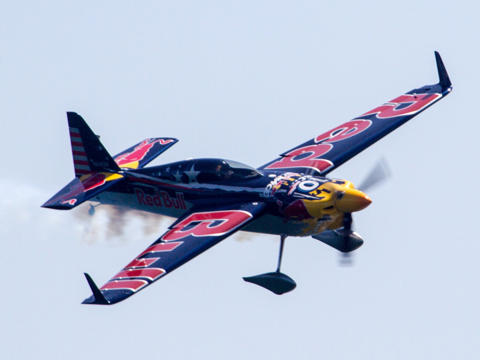 2017年レッドブル・エアレース・ワールドシリーズ 千葉 カービー・チャンブリス(アメリカ合衆国)の機体